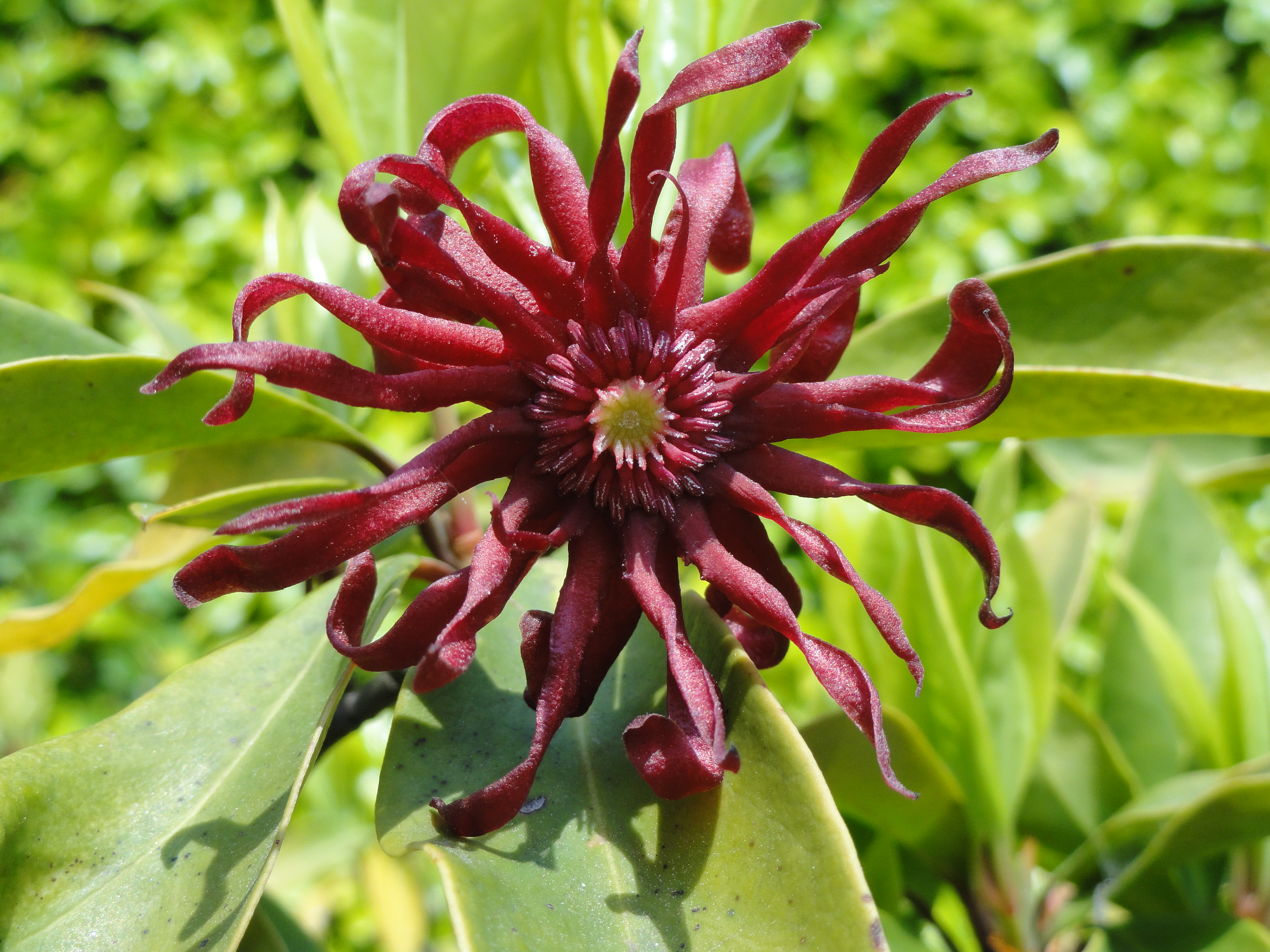 Illicium floridanum. Botanical specimen on Isola Madre (Stresa), Lake Maggiore, Italy.